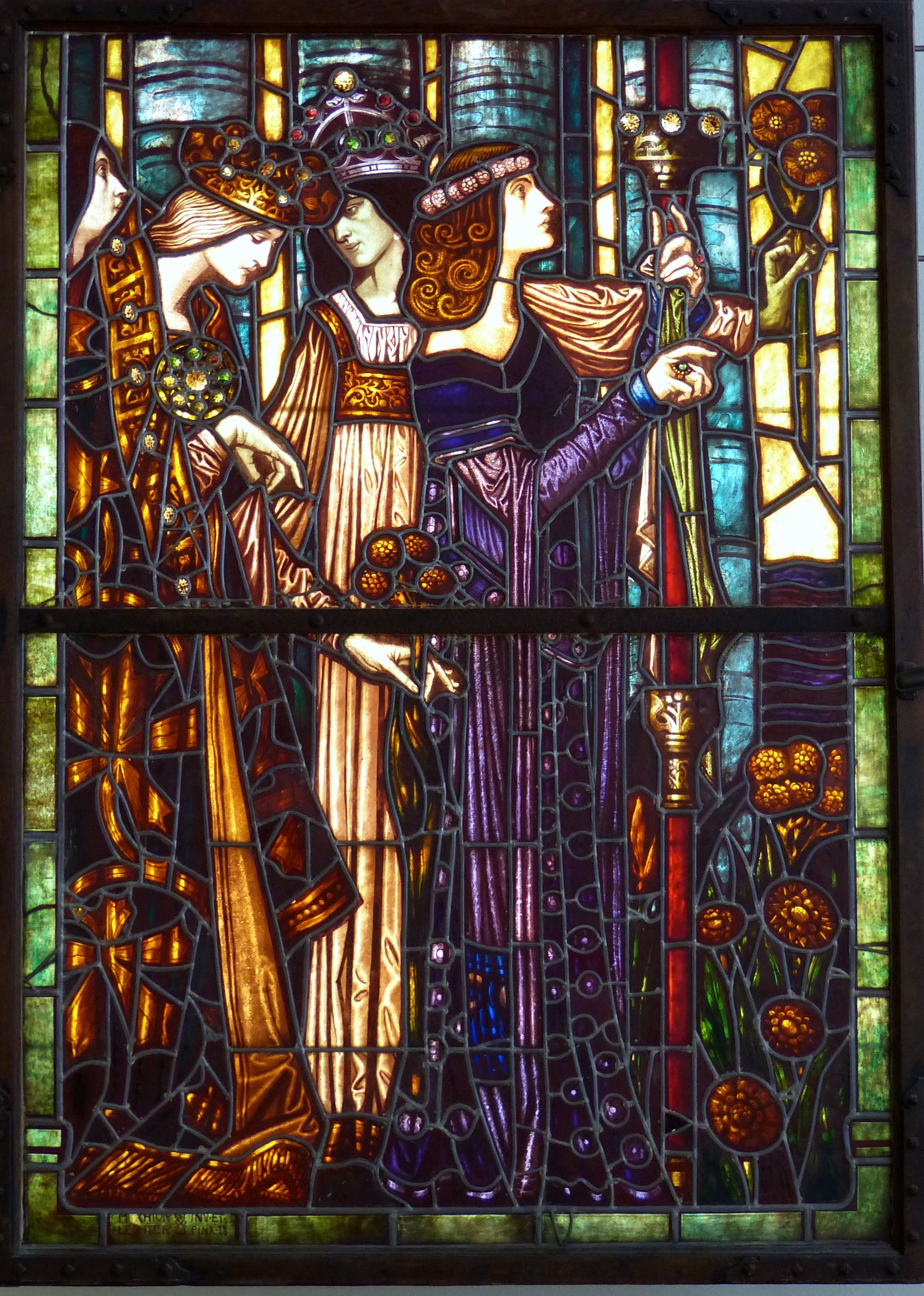 "Pallenberg-Fenster" aus dem von Jakob Pallenberg gestifteten Saal des Kunstgewerbemuseums am Hansaring; Melchior Lechter (1898 bis 1900) (MAK)